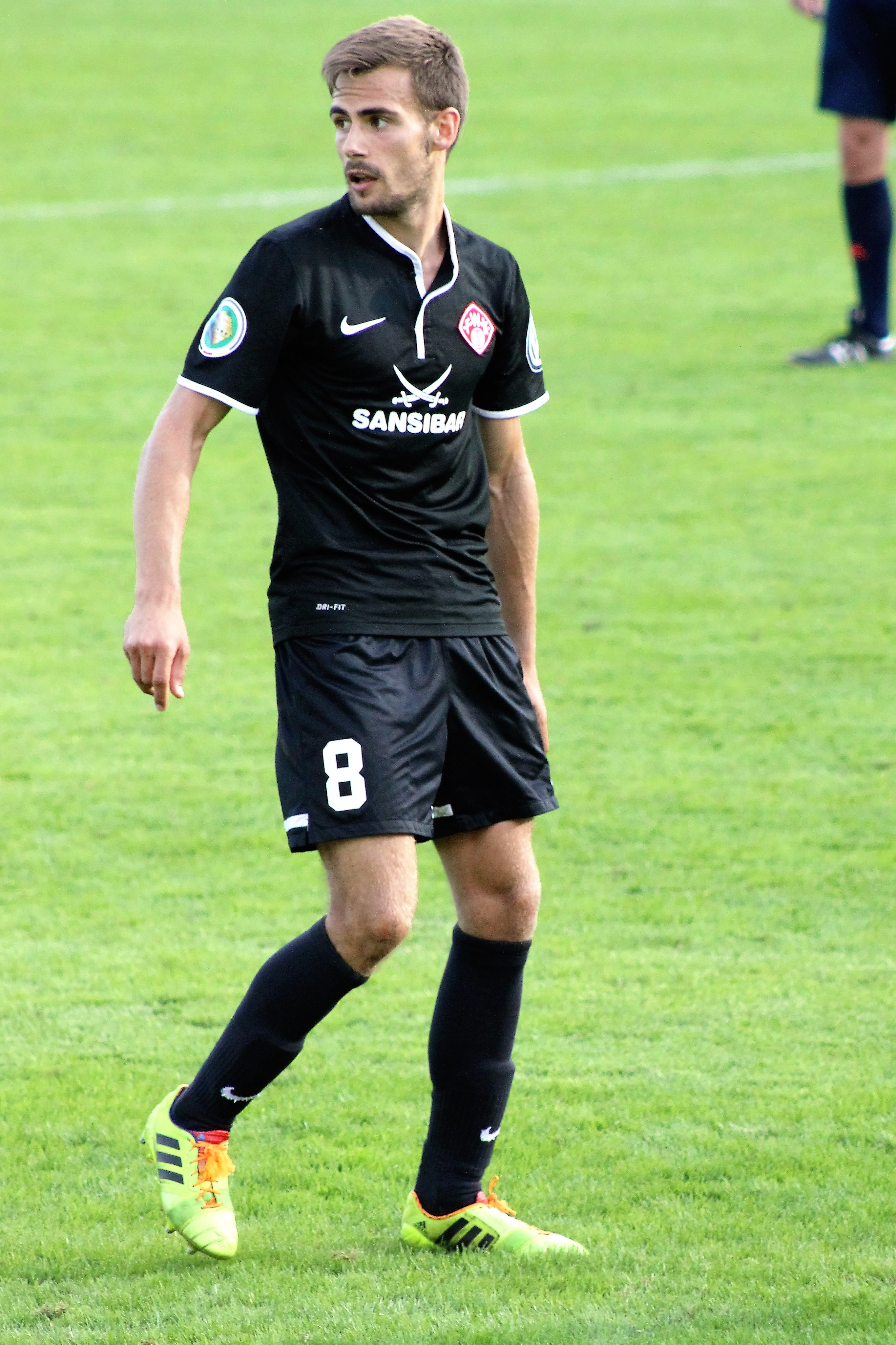 Vocaj, Liridon Würzburg 14-15